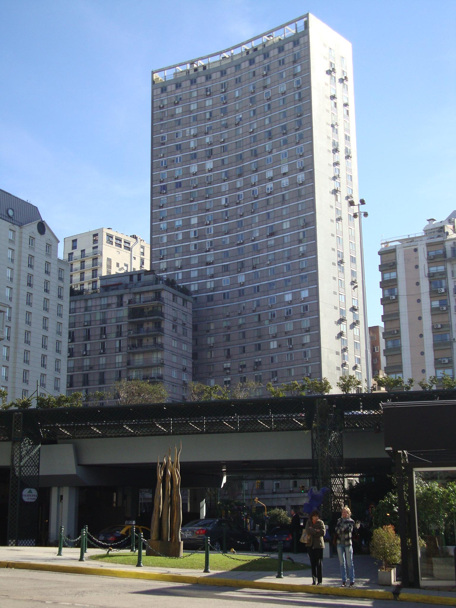 Edificio Sudamérica (Cerrito 1480), obra del arquitecto Arturo Dubourg. Visto desde la calle Carlos Pellegrini. Buenos Aires, Argentina.